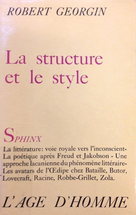 La structure et le style, Lausanne, L'Âge d'Homme, coll. "Sphinx", 1975.